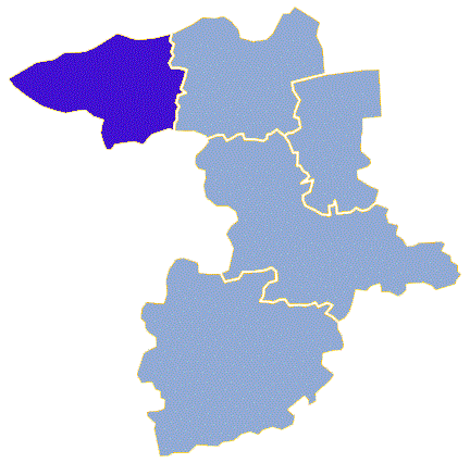 Powiat sulęciński - Gmina Słońsk